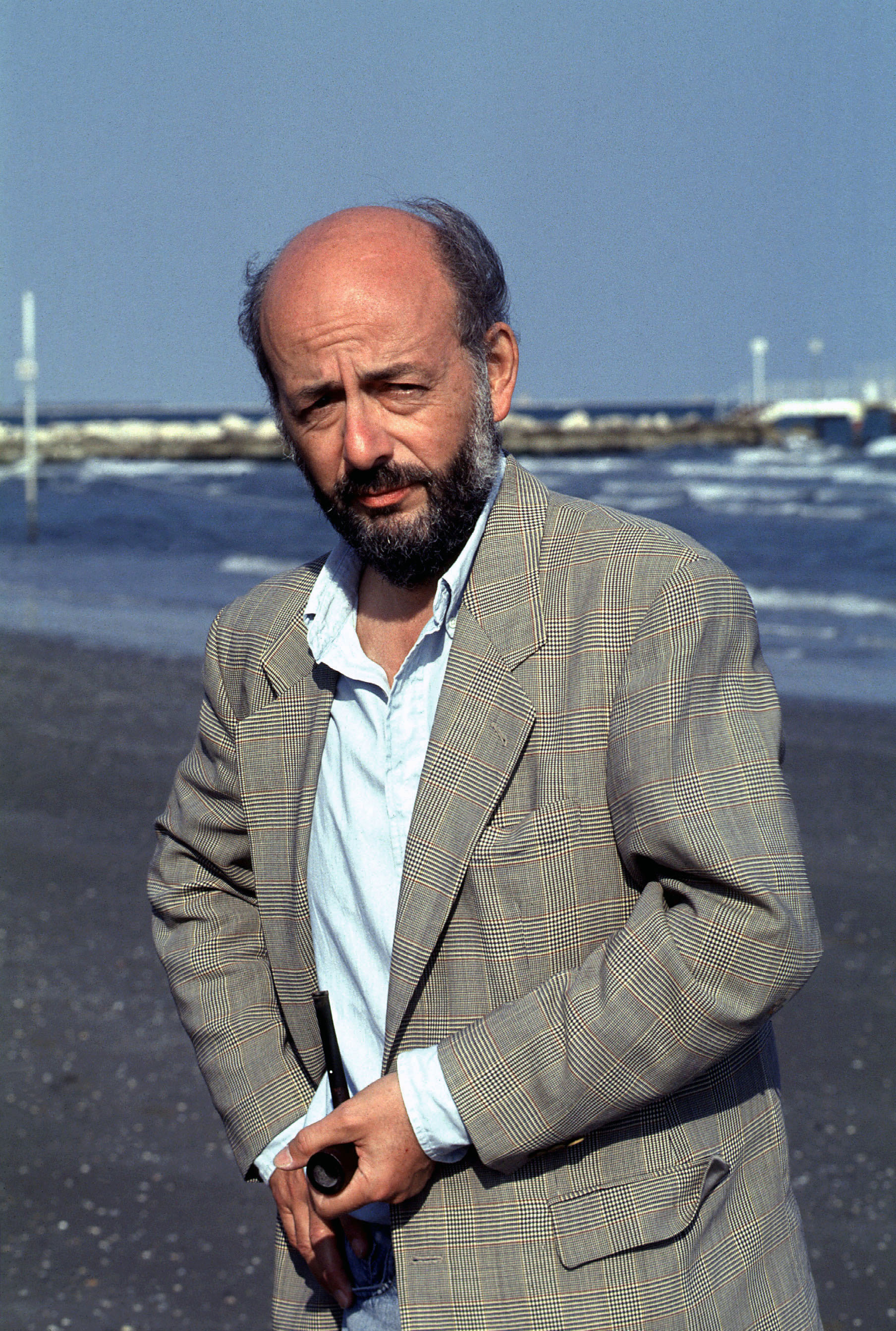 Bertrand Blier alla Mostra del cinema di Venezia nel 1993